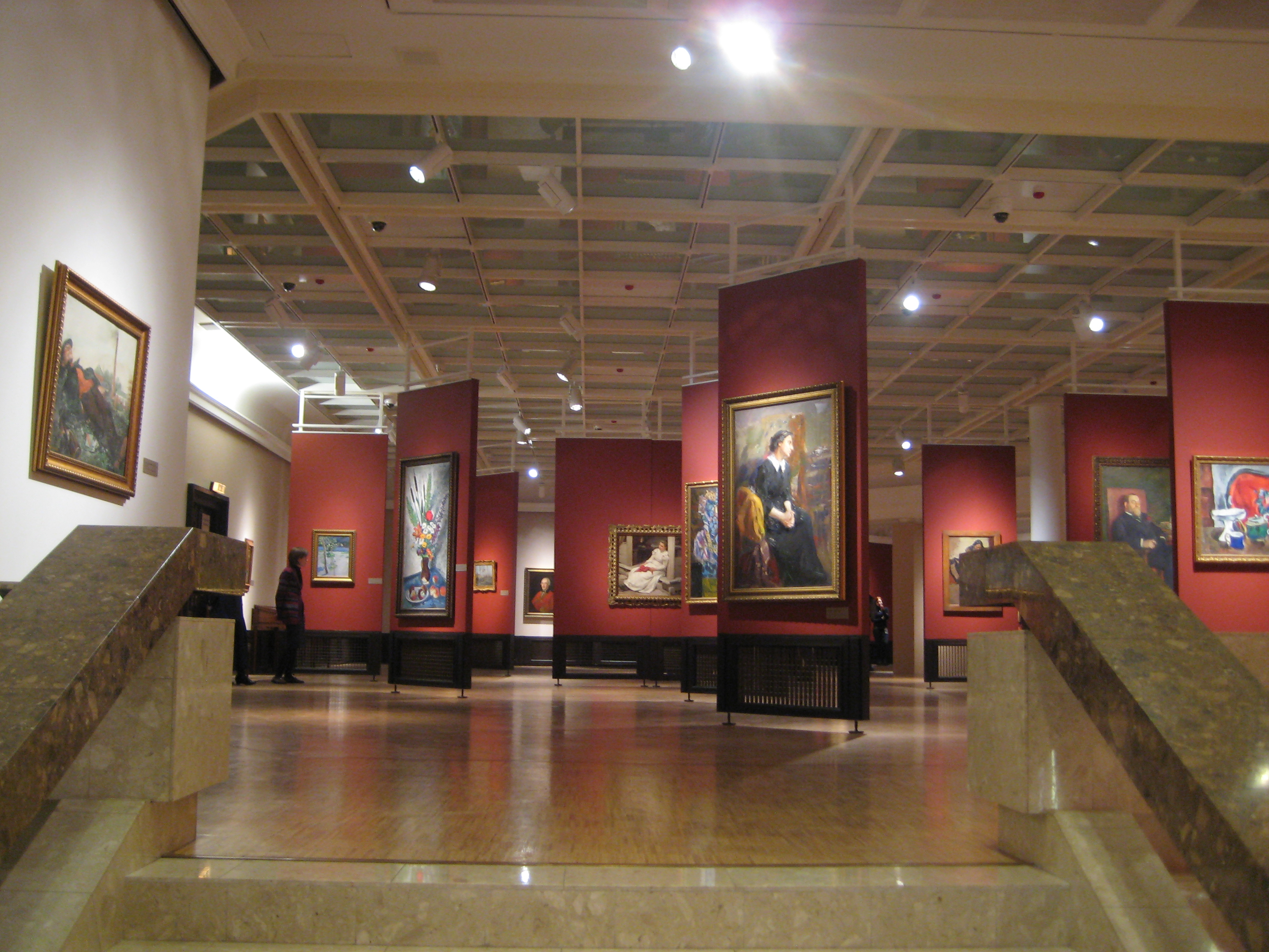 Третьяковская галерея. Инженерный корпус. Выставка картин из Курской галереи